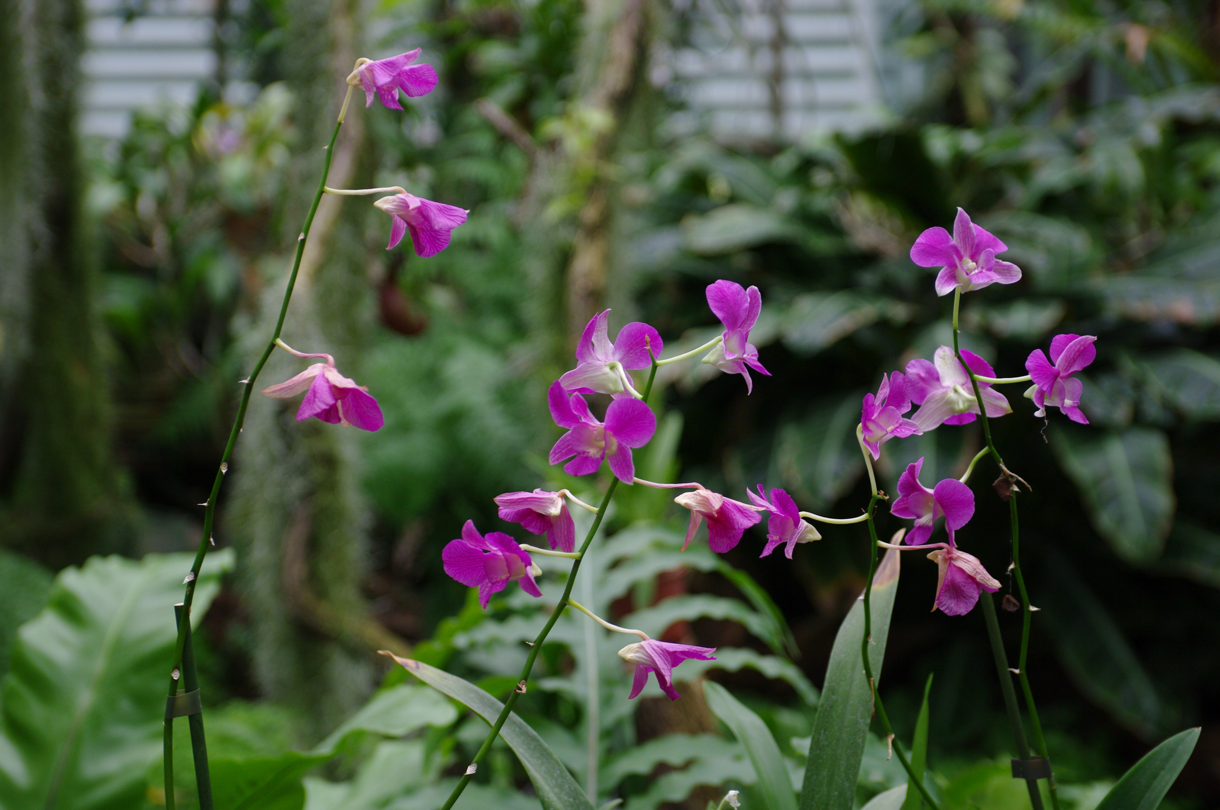 Національний ботанічний сад ім. М.Гришка, Печерський район